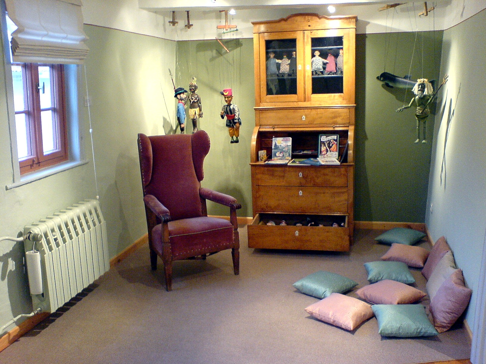 Literaturmuseum über Theodor Storm in Bad Heiligenstadt (Deutschland)